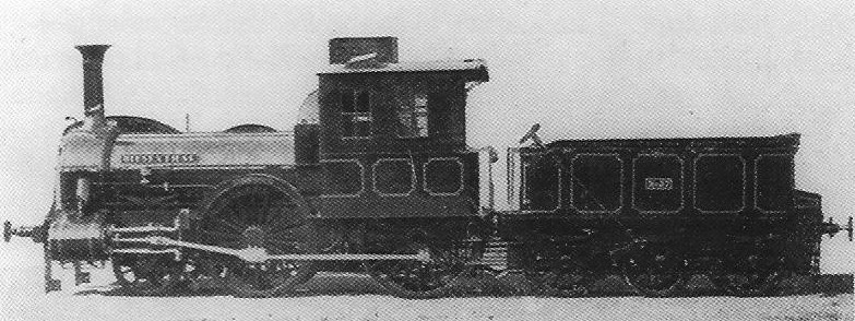 Lokomotive BIESENTHAL der Berlin-Stettiner Eisenbahn-Gesellschaft